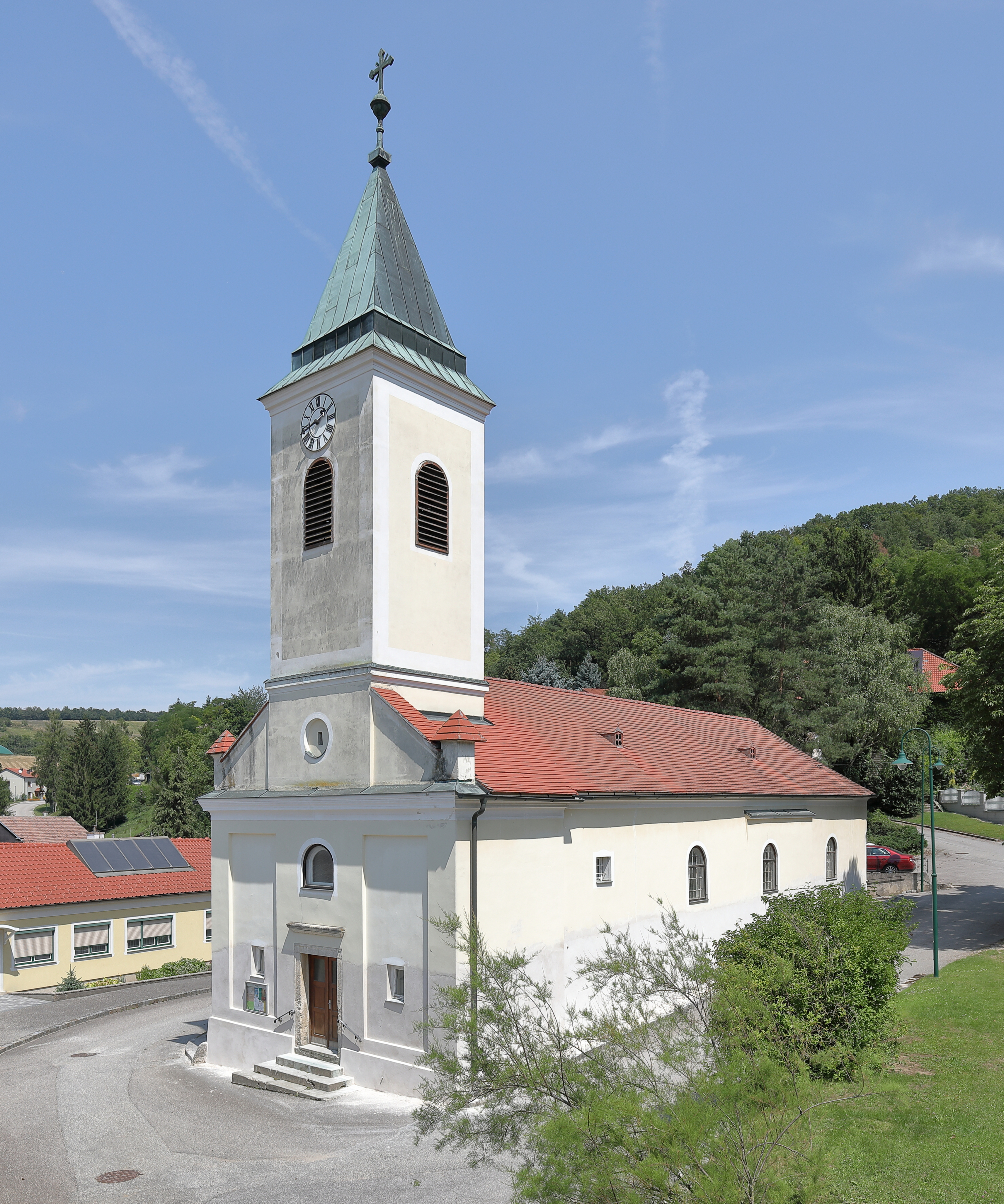 Südwestansicht der röm.-kath. Pfarrkirche heiliger Ägydius in Bergau, ein Ortsteil der niederösterreichischen Marktgemeinde Göllersdorf.Eine schlichte Saalkirche mit klassizistischer Westturmfassade. Im Zuge der Josephinischen Kirchenreform wurde sie 1784 zur Pfarrkirche geweiht.